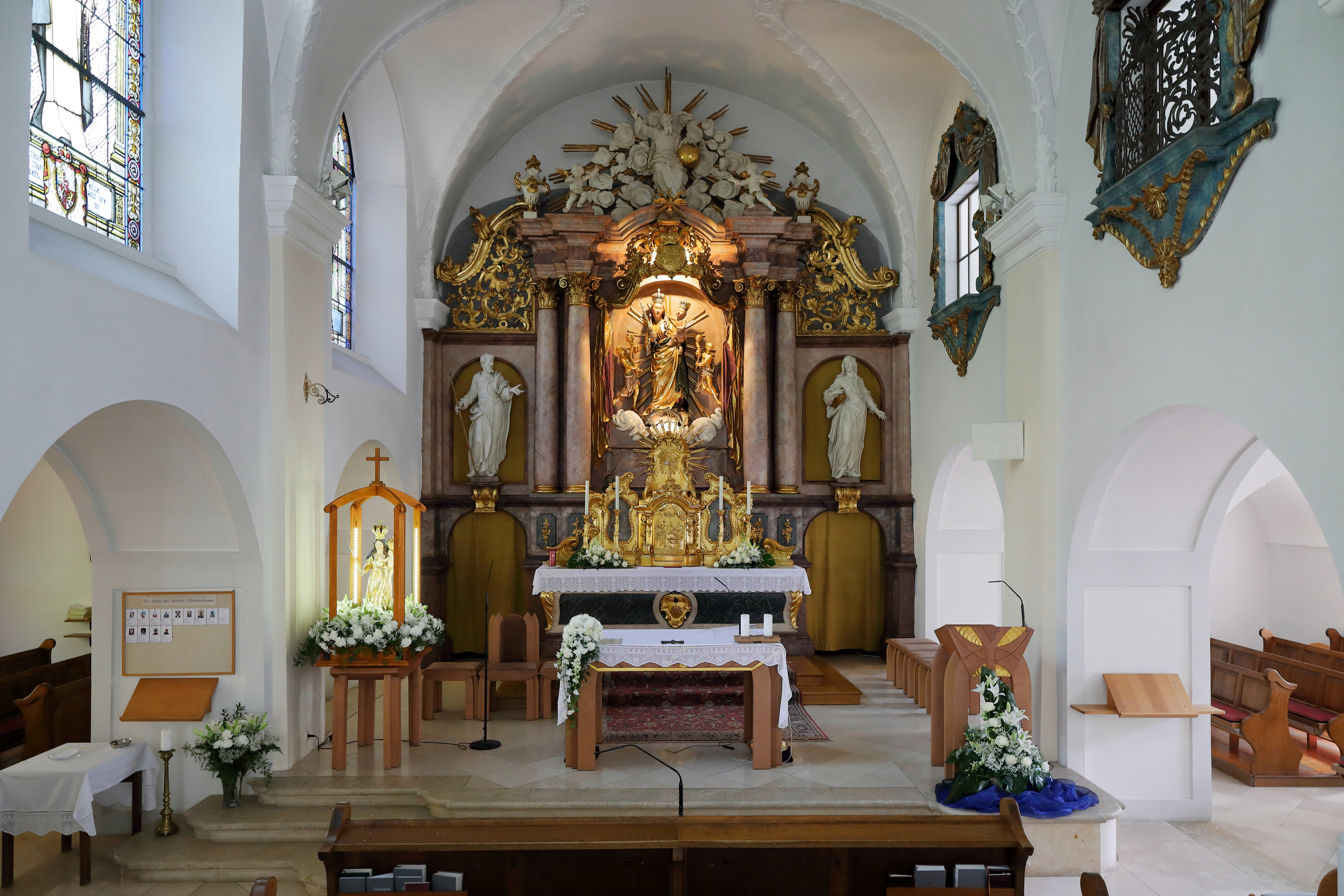 Innenansicht in Richtung Hochaltar der röm.-kath. Pfarrkirche Maria Himmelfahrt in der burgenländischen Gemeinde Forchtenstein.